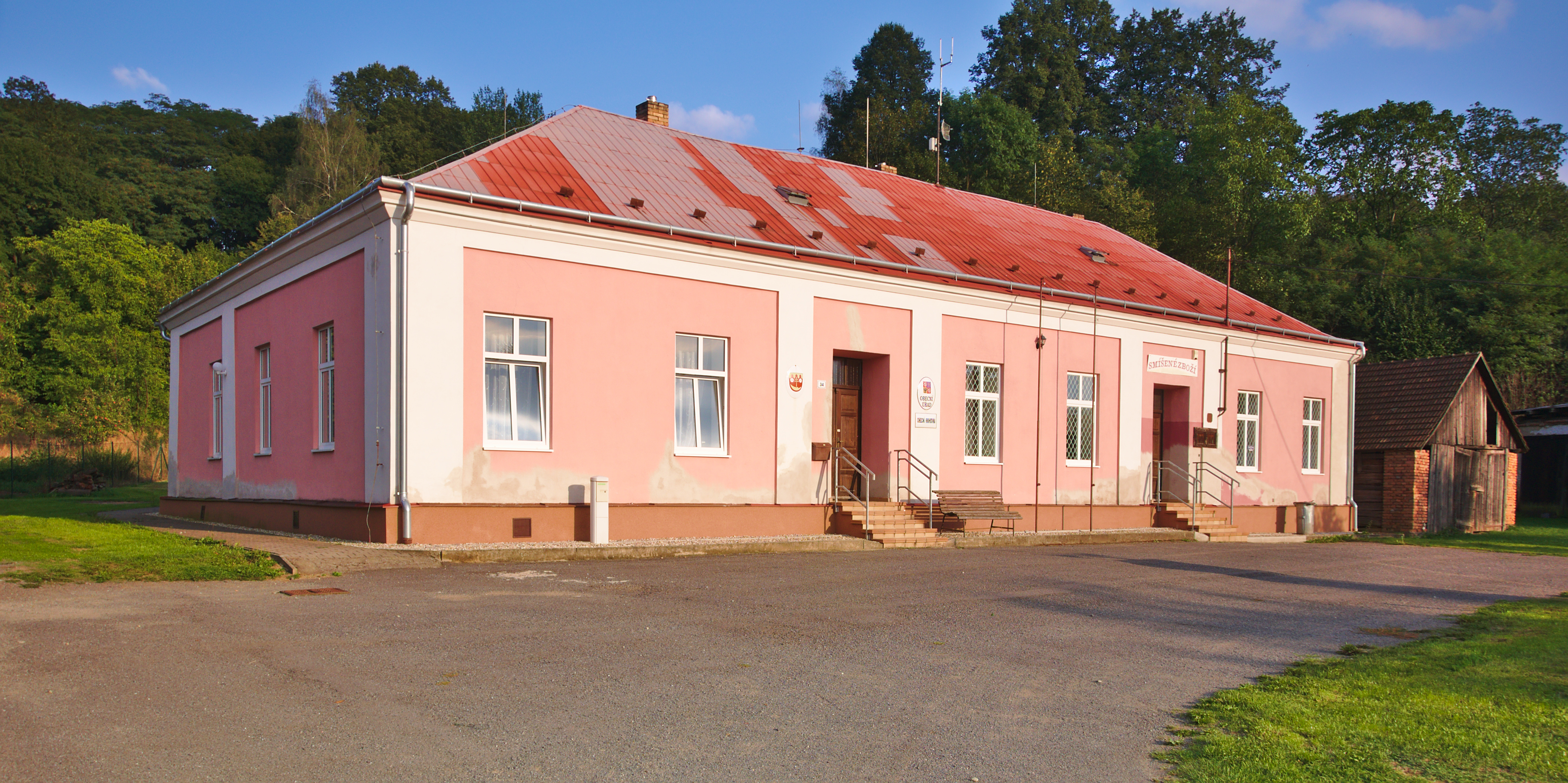 Obecní úřad, knihovna a obchod, Vrážné, okres Svitavy